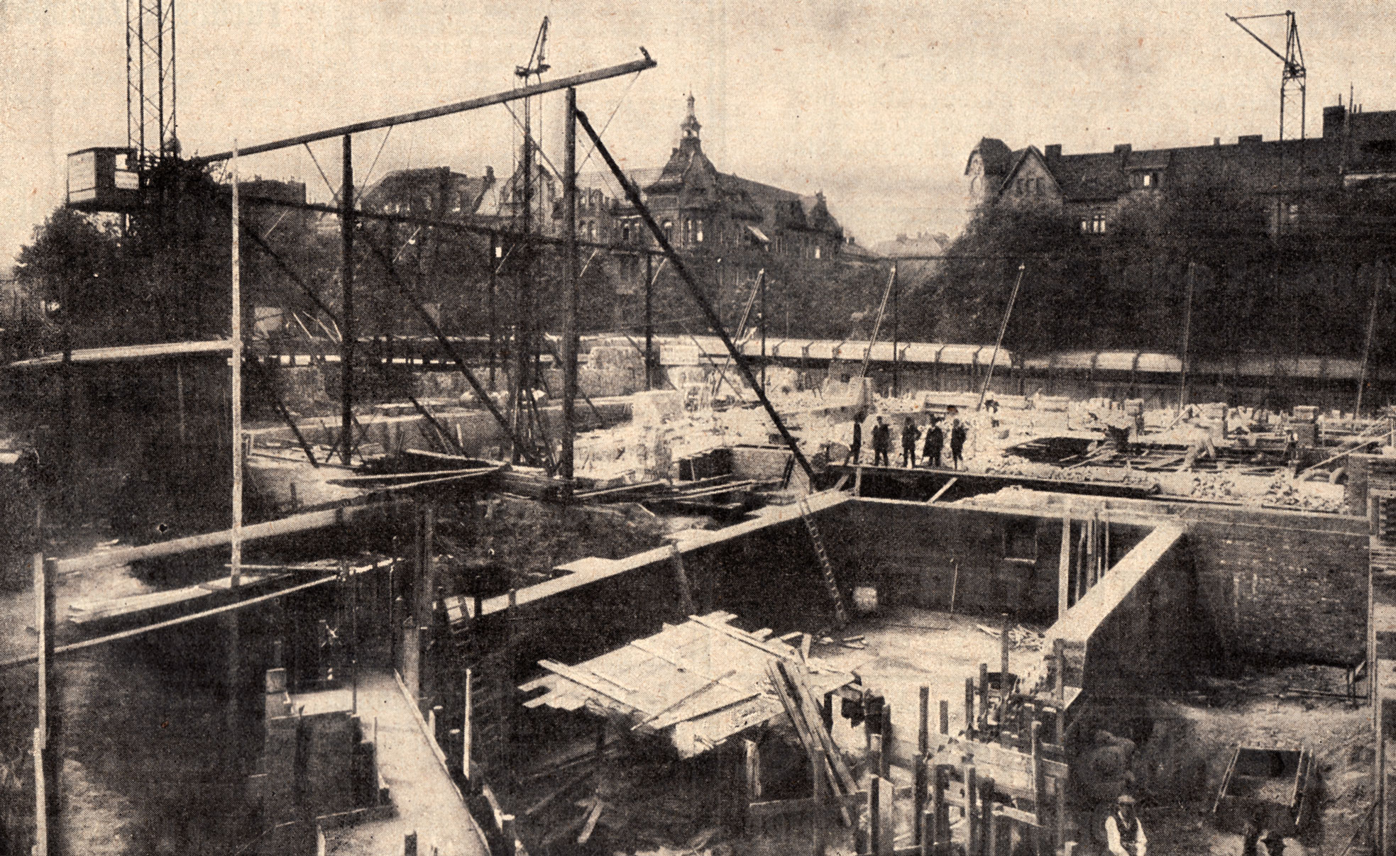 Berlin - Bau des Rathauses Friedenau, Werbeannonce in der Zeitschrift Bauwelt 1914